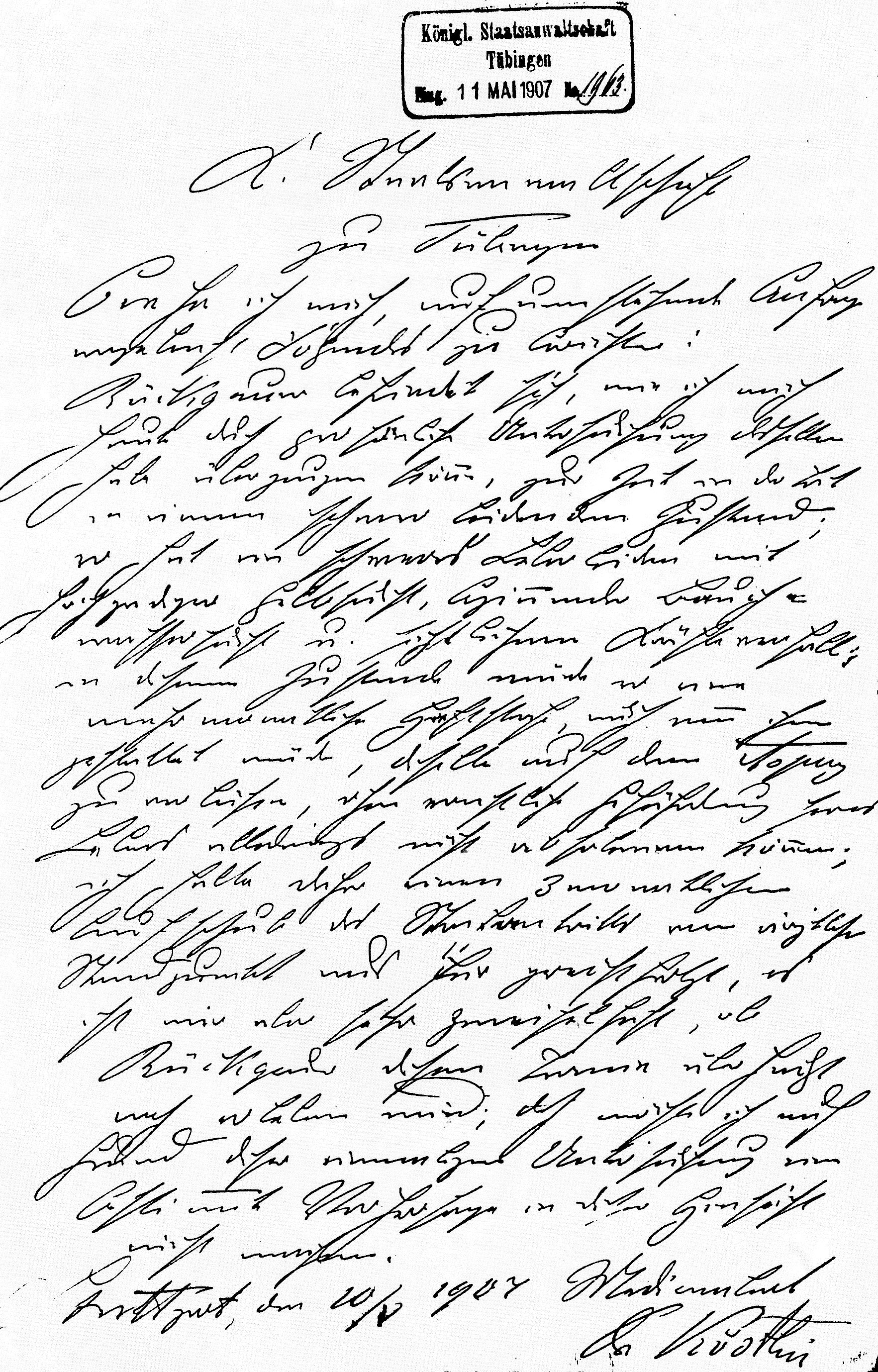 Haftunfähigkeitsbescheinigung für Erasmus Rückgauer